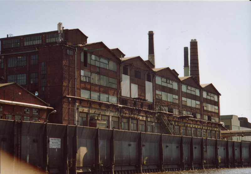 ehemalige Kupferelektrolyse der Norddeutschen Affinerie (seit 1. April 2009 Aurubis AG) in Hamburg am Müggenburger Kanal. (inzwischen abgerissen)